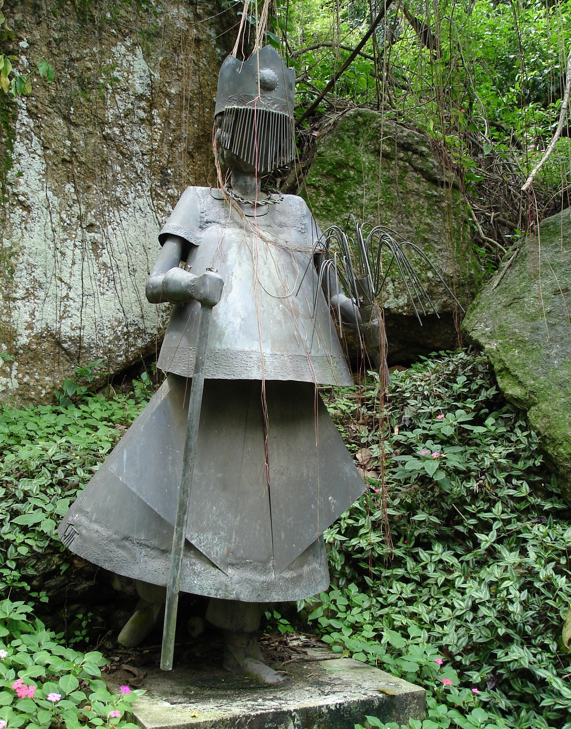 "Iansã": Sculpture at the Catacumba Park, Rio de Janeiro, Brazil